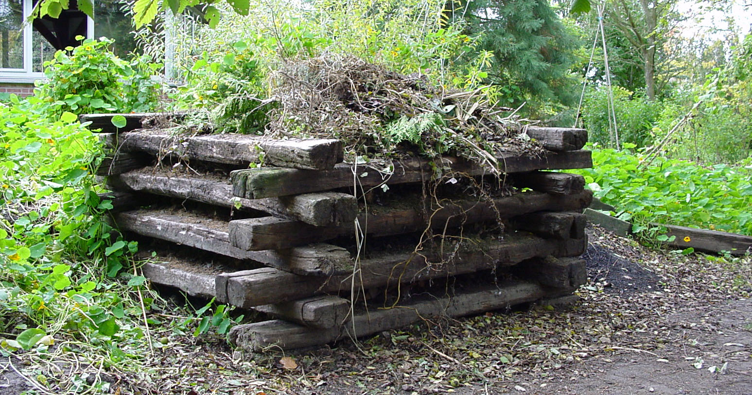 Compostière faite avec traverses de chemin de fer récupérées (au risque de polluer le compost avec la créosote)